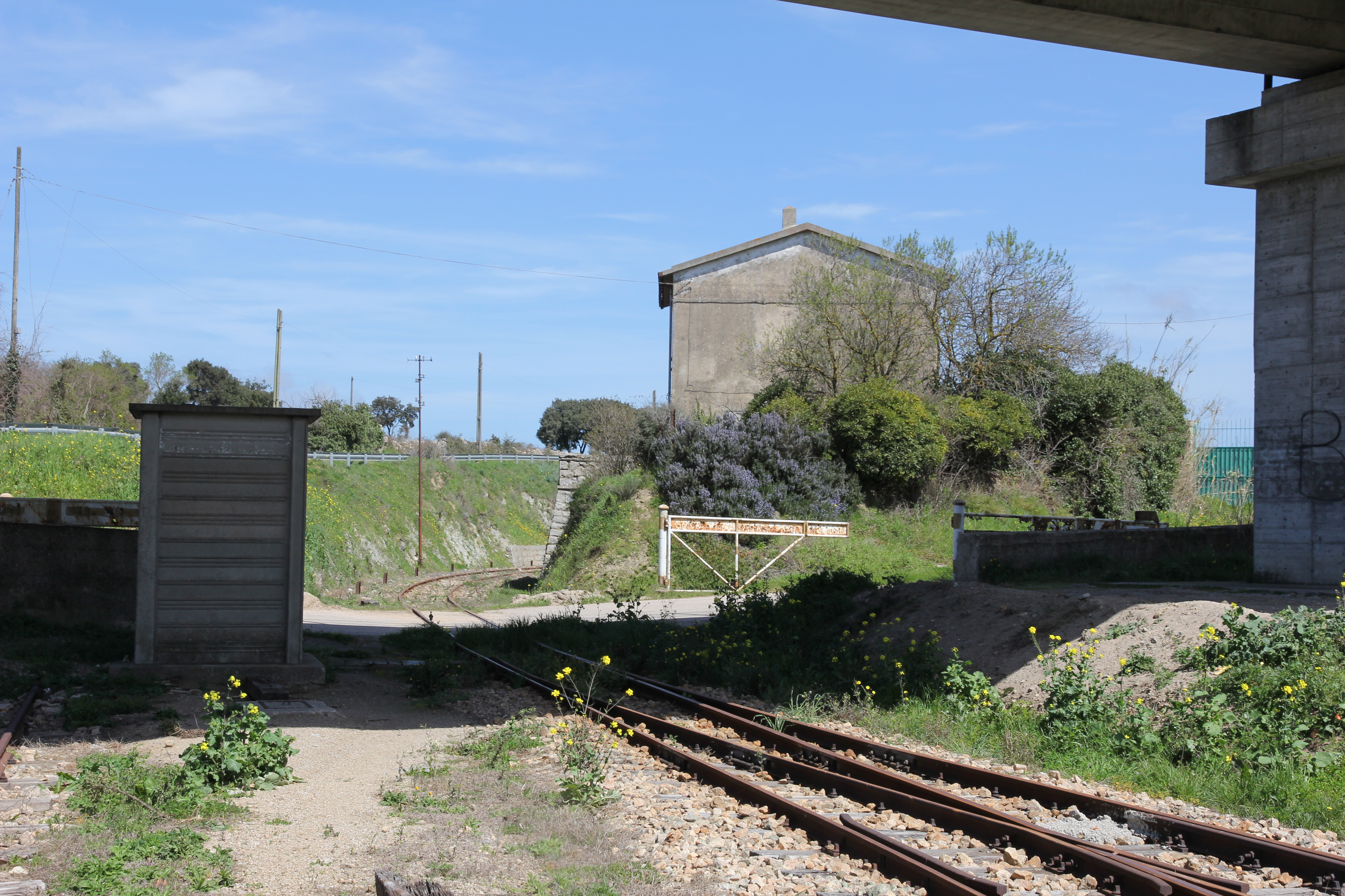 Ferrovia Sassari-Tempio-Palau. Stazione ferroviaria di Luras (comune di Calangianus).